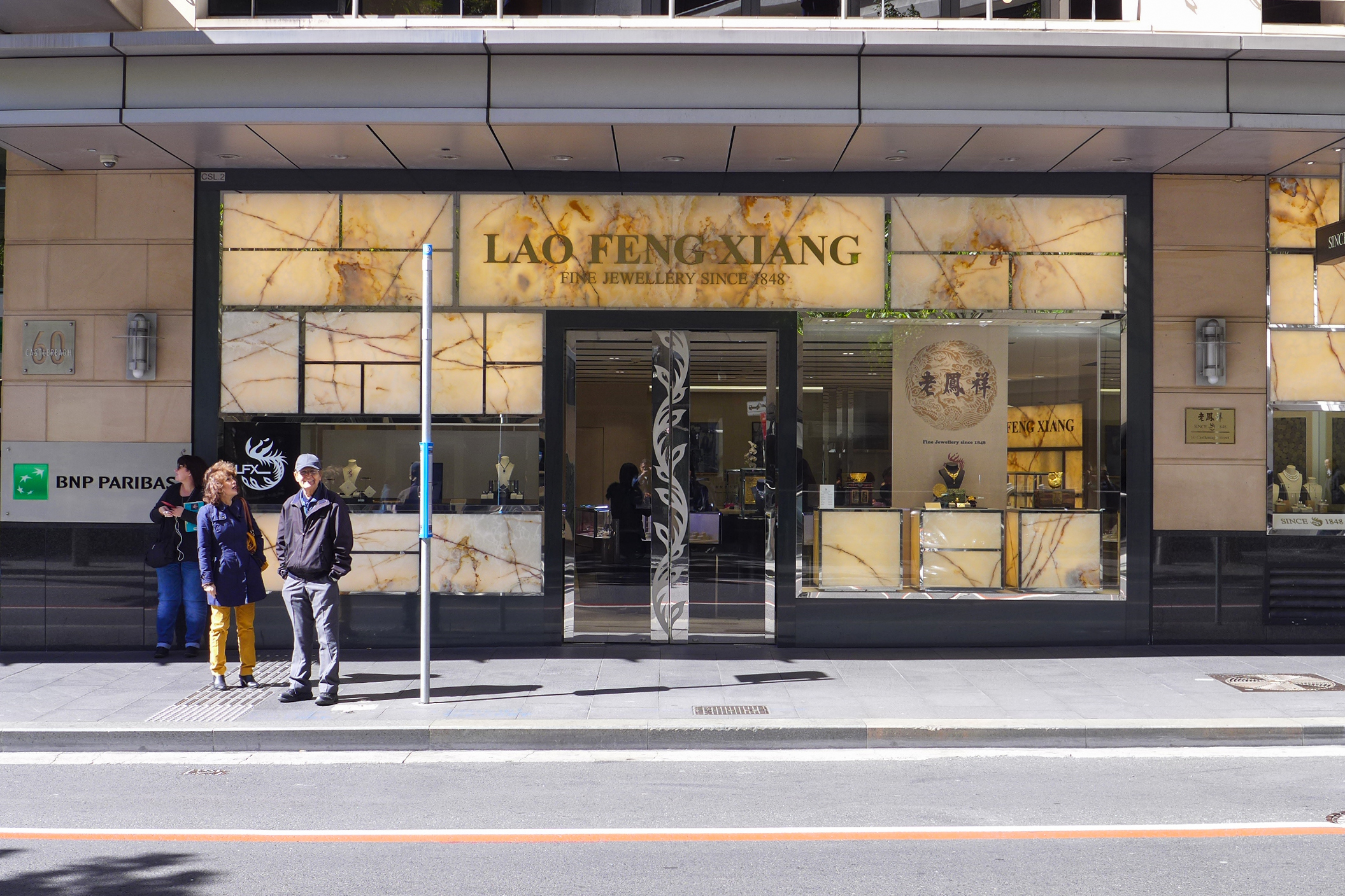 Lao Feng Xiang in Sydney